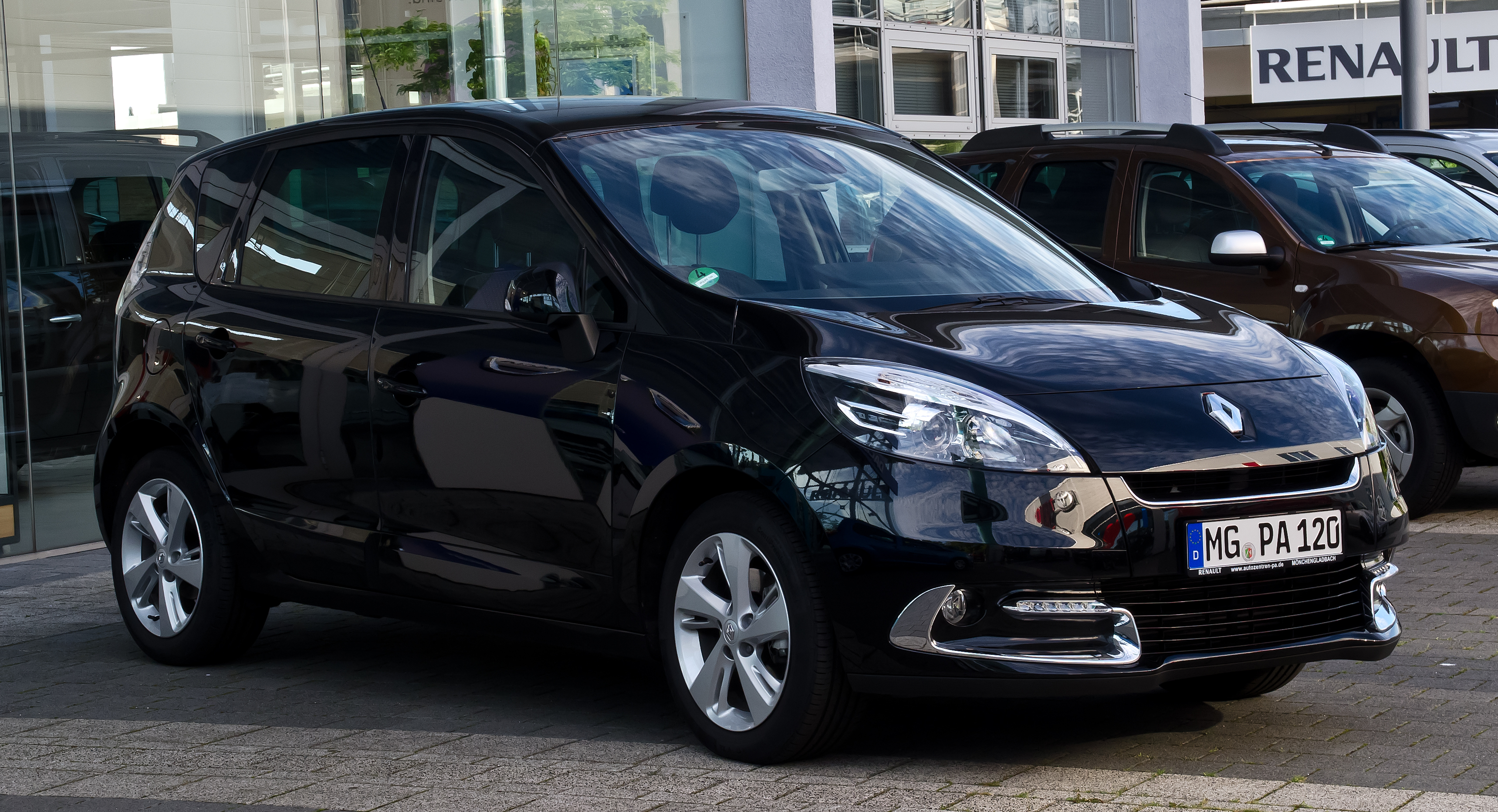 Renault Scénic Dynamique ENERGY dCi 130 Start & Stop (III, Facelift)